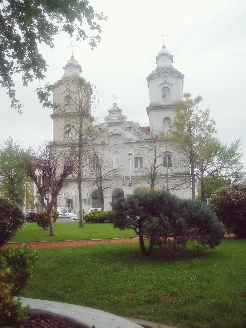 Parroquia Nuestra Señora del Pilar. Pilar, Provincia de Buenos Aires, Argentina.